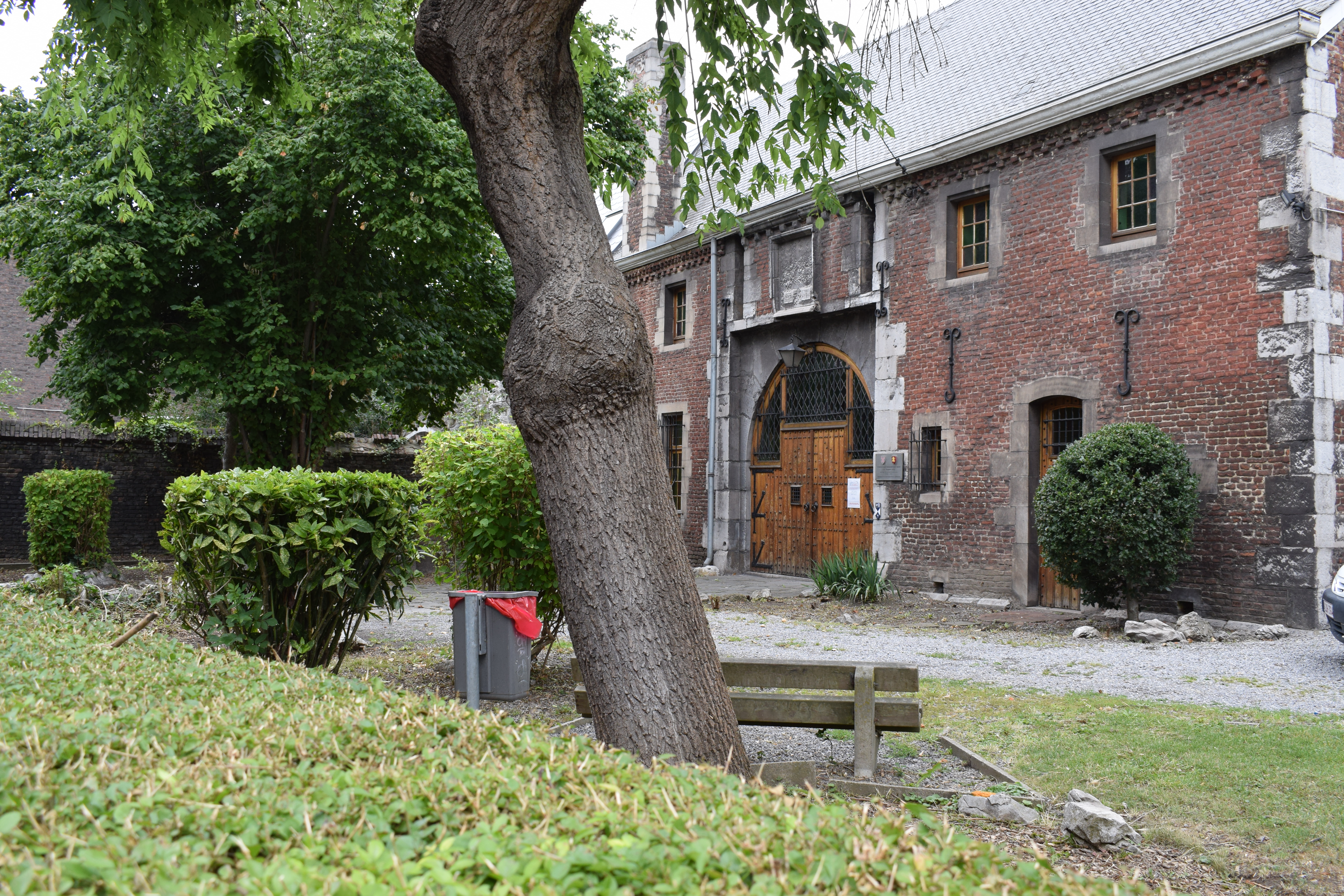 Vue de Jemeppe-sur-Meuse, dans la commune de Seraing (province de Liège, en Belgique).